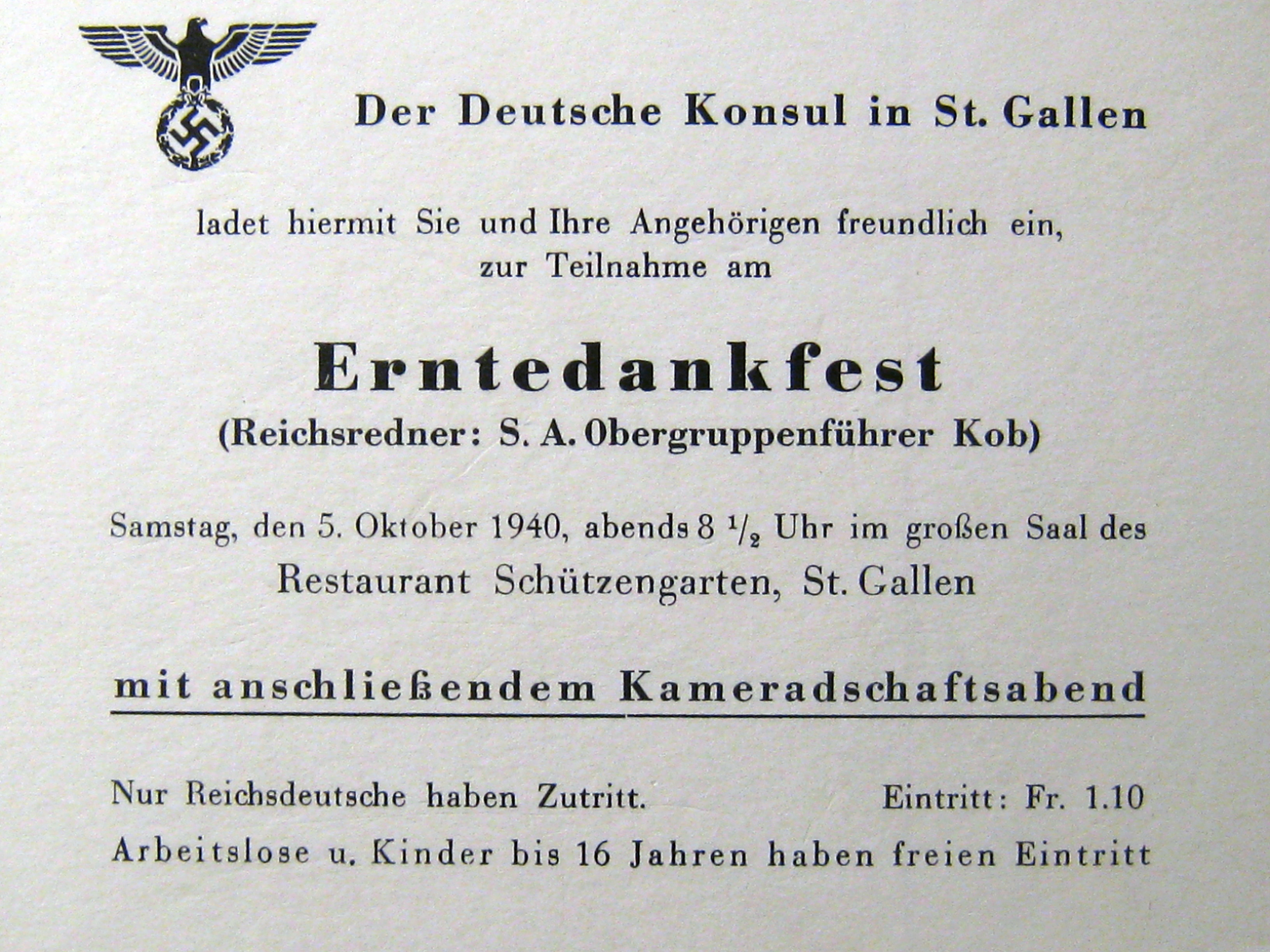 Einladung zum Erntedankfest 1940 des dt. Konsulats in St. Gallen, fotografiert in St. Margrethen, Kanton St. Gallen, in der Festung Heldsberg